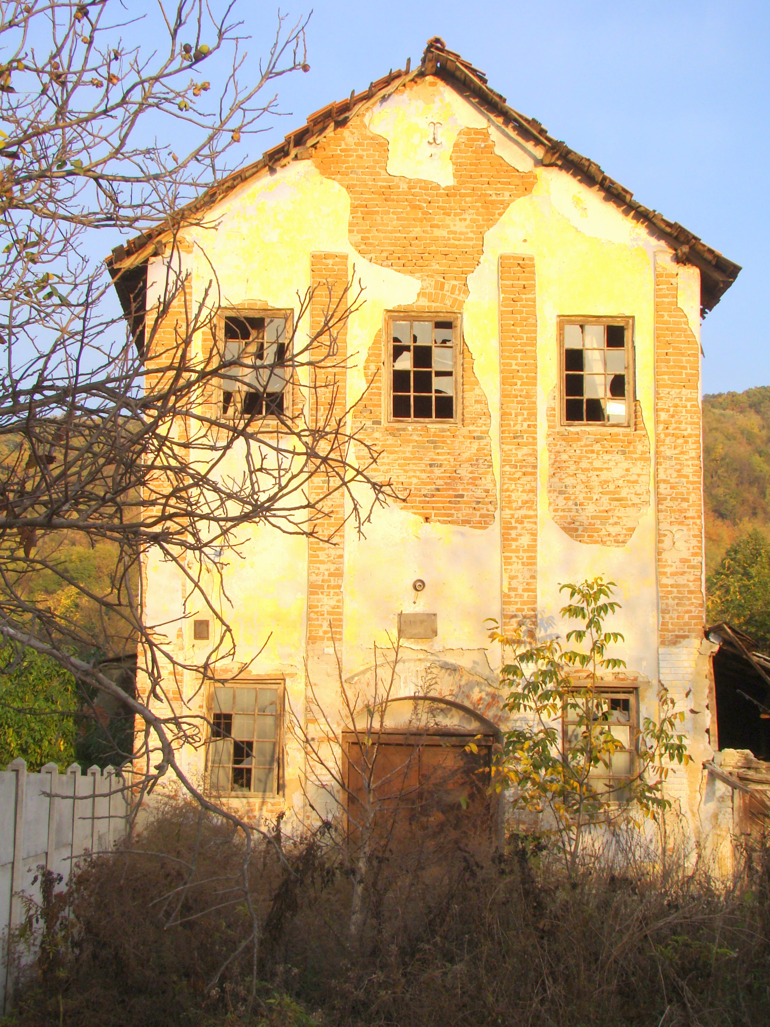 Moară, sat Plopșoru; comuna Plopșoru înc. sec. XX